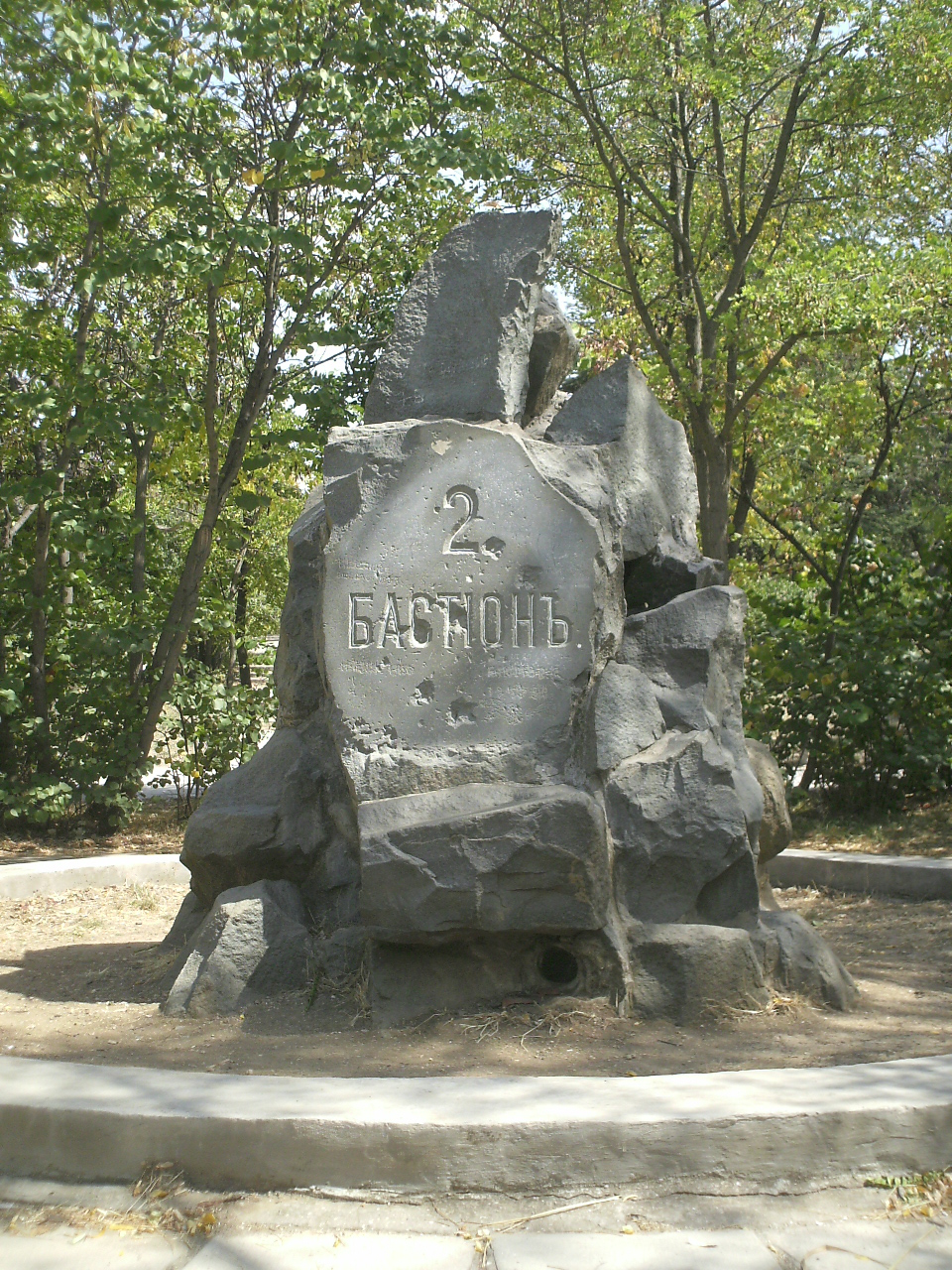 Пам'ятник 2-му бастіону в Севастополі